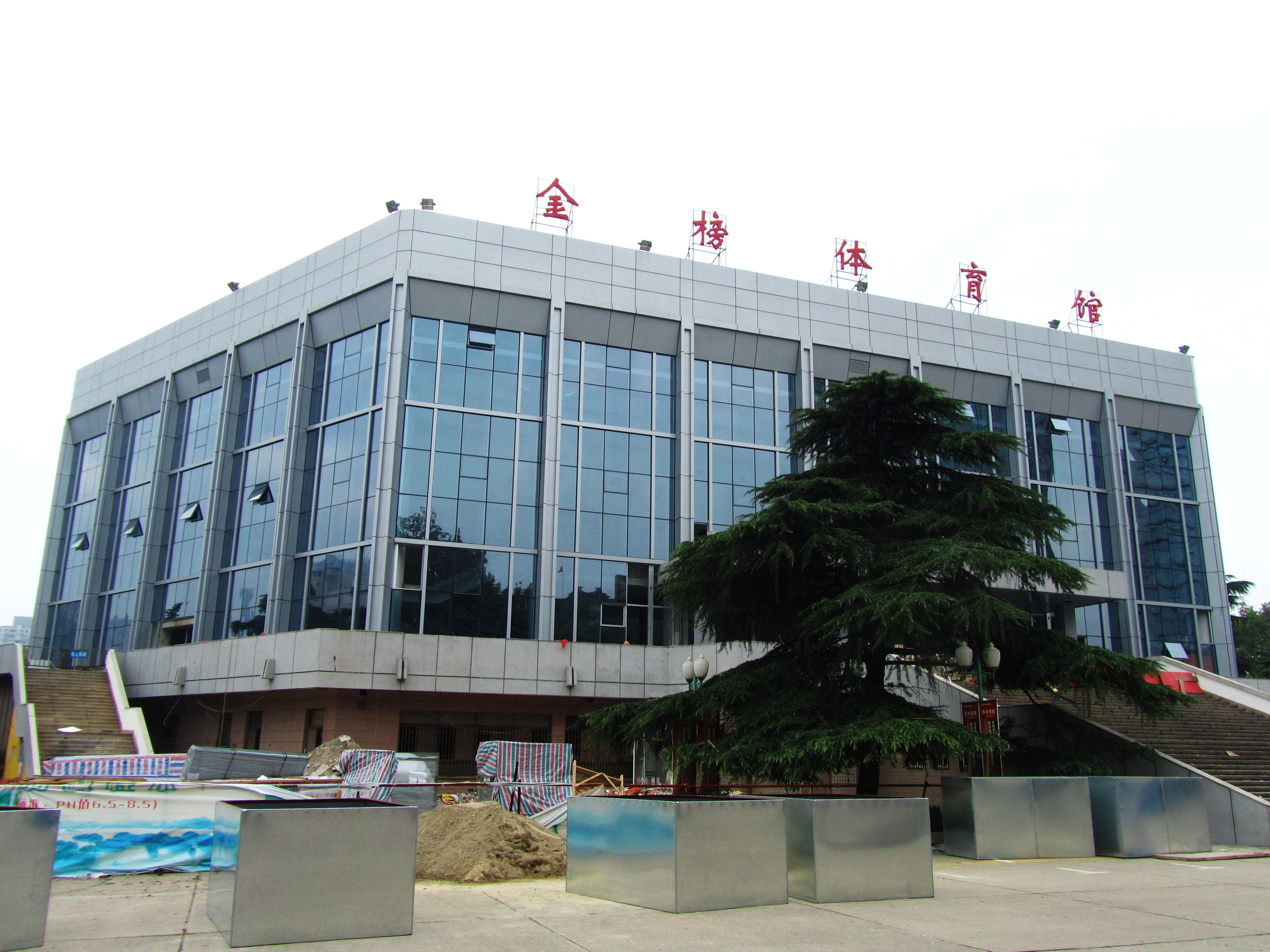 南京五台山体育中心内的金榜体育场。